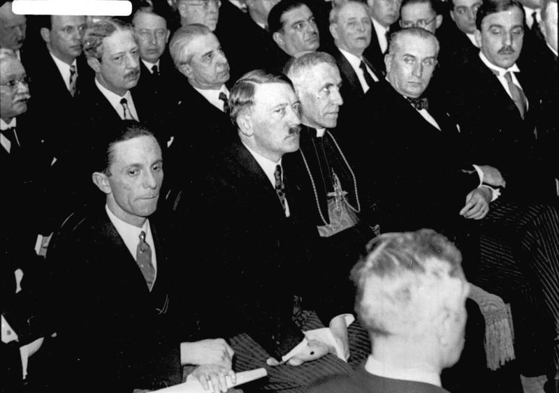 Von links nach rechts: Reichsminister Dr. Goebbels, Reichskanzler Adolf Hitler, und der päpstliche Nuntius Osenigo auf dem Empfang der auswärtigen Presse in Berlin.